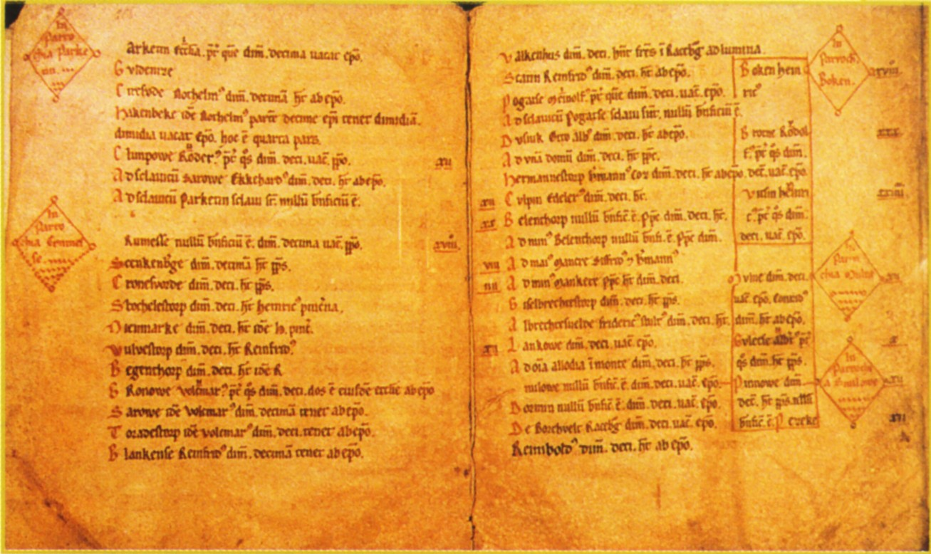 Ratzeburger Zehntregister: Einträge 82 [P]arketin (Berkenthin) bis 124 Pinnowe (Pinnau), ab 119 "Boken" (Büchen) in Randspalte